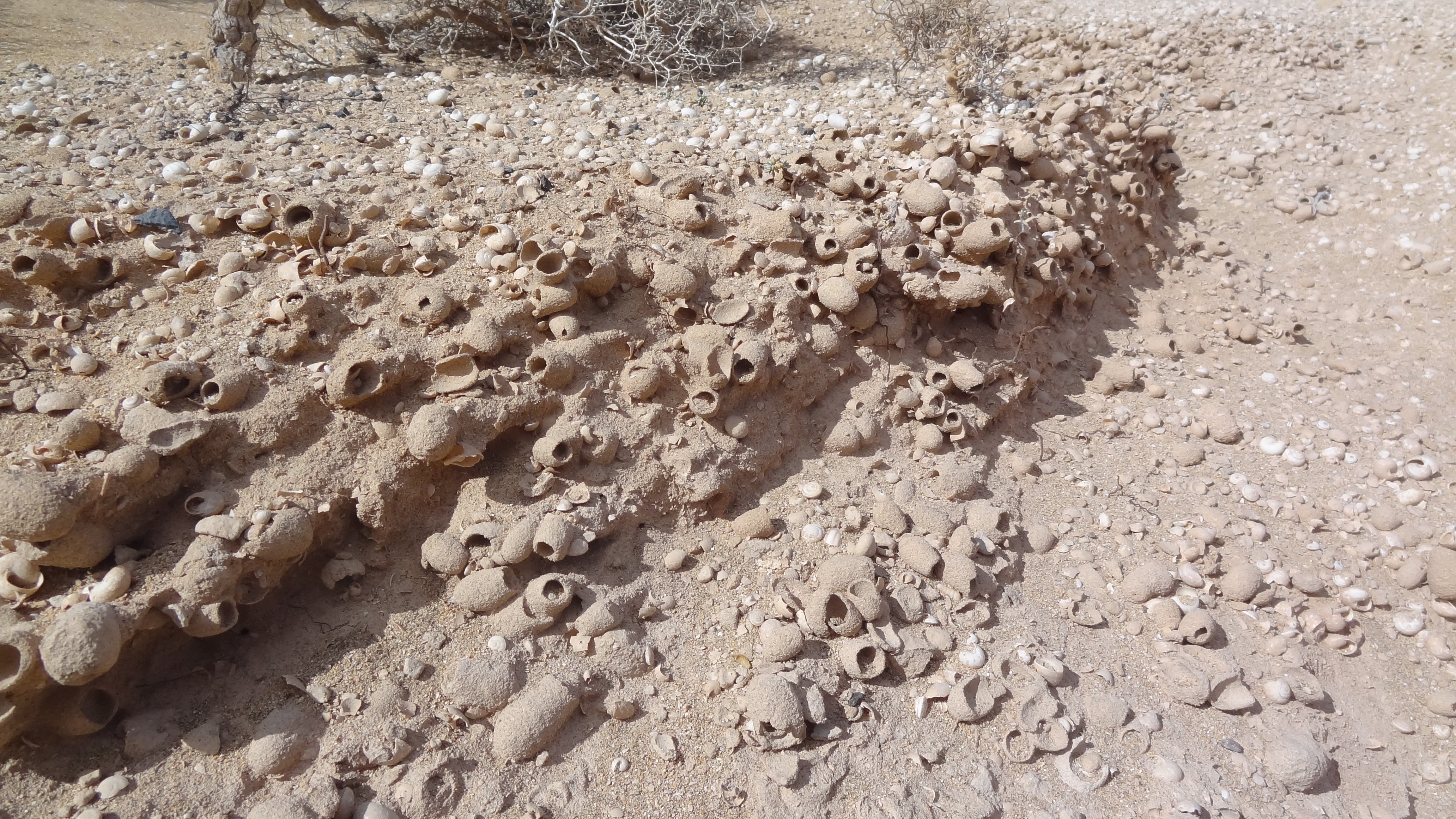 Sporenfossielen (ichnofossielen) Rebuffoichnus guanche van poppenkamer van een snuitkever (Curculionidae) of bladsprietkever (Scarabaeidae)